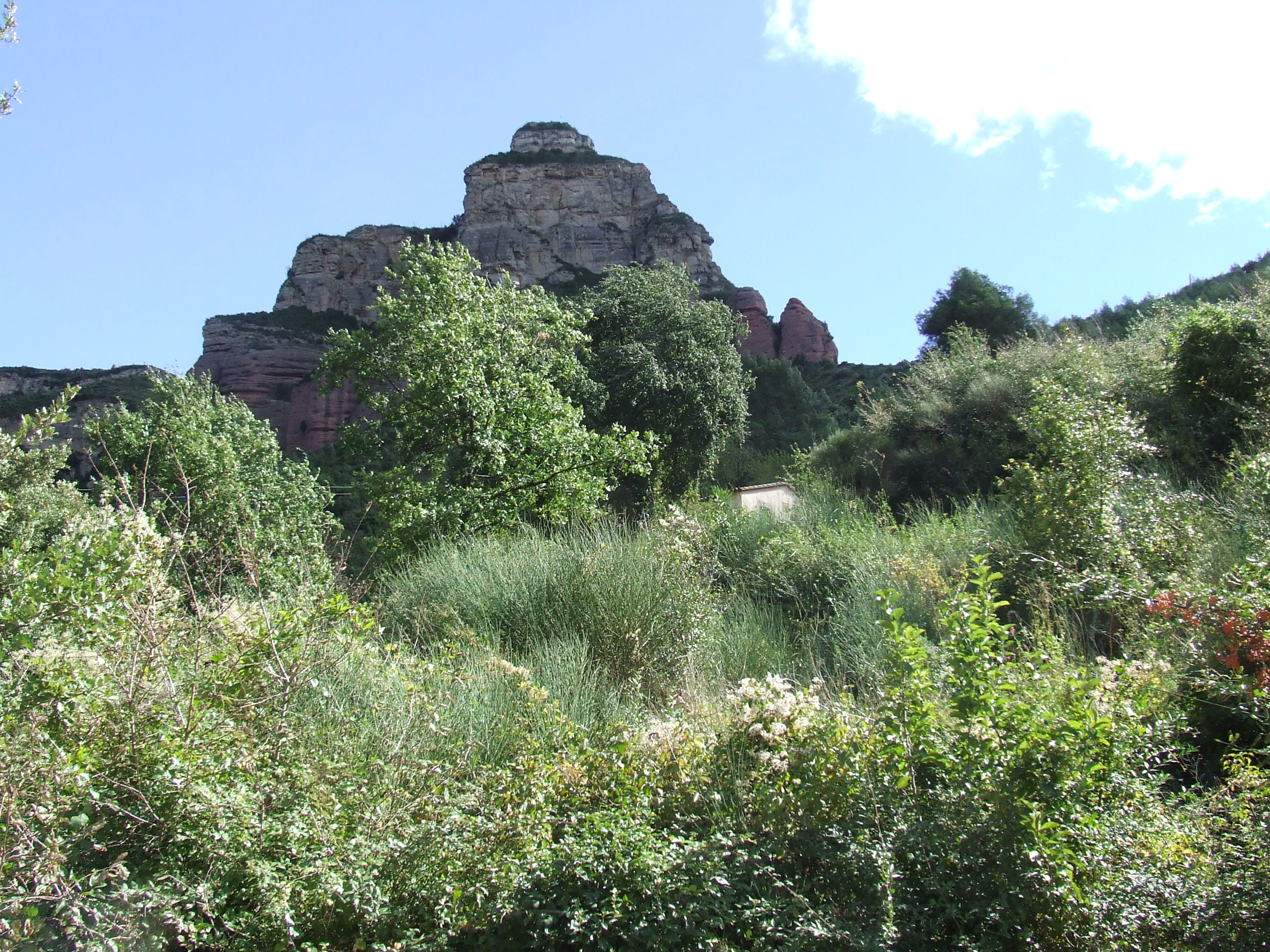 Can Tabola (Riells del Fai, Bigues i Riells, Vallès Oriental)